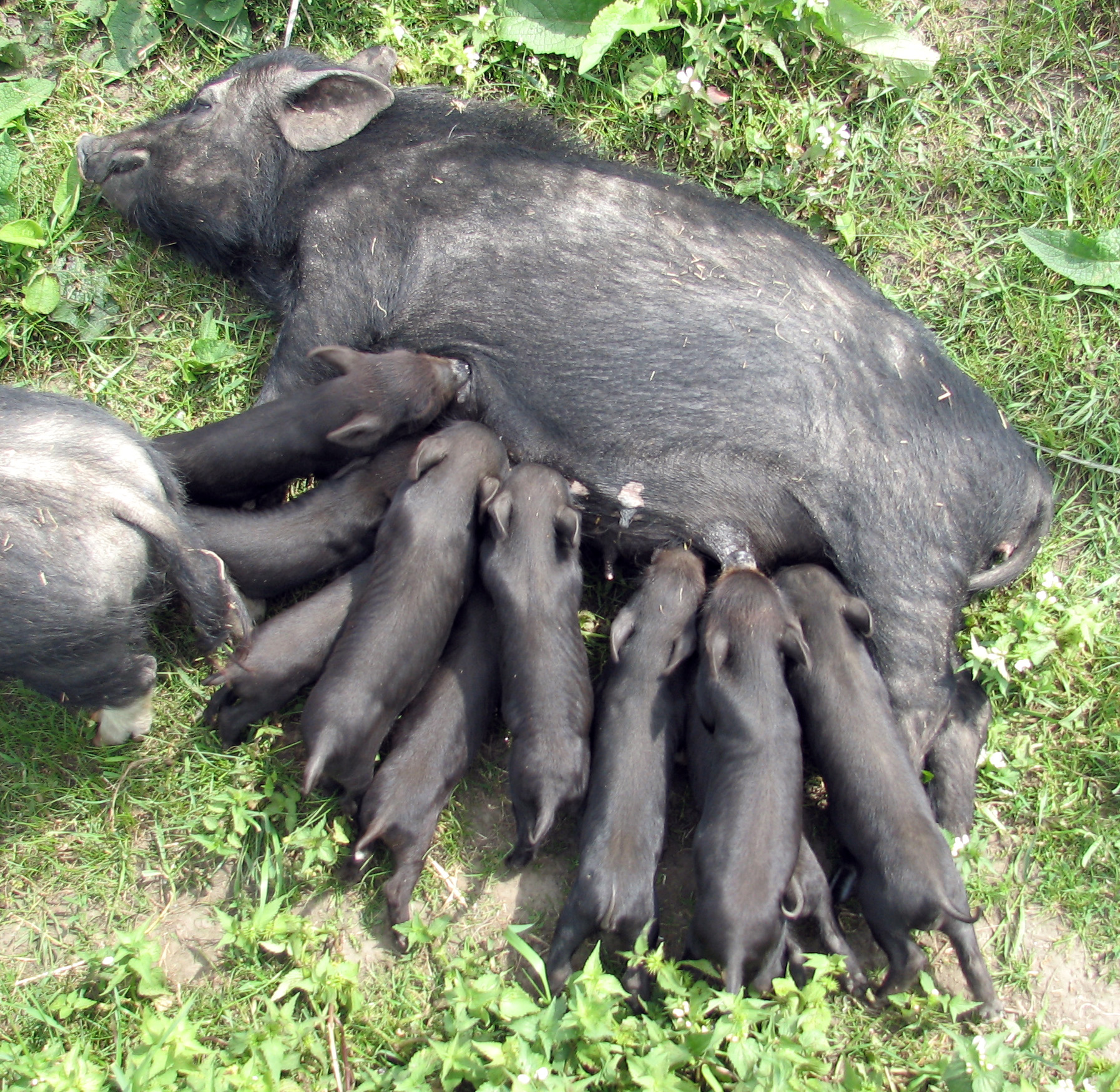 Eine säugende Sau und ihre Ferkel